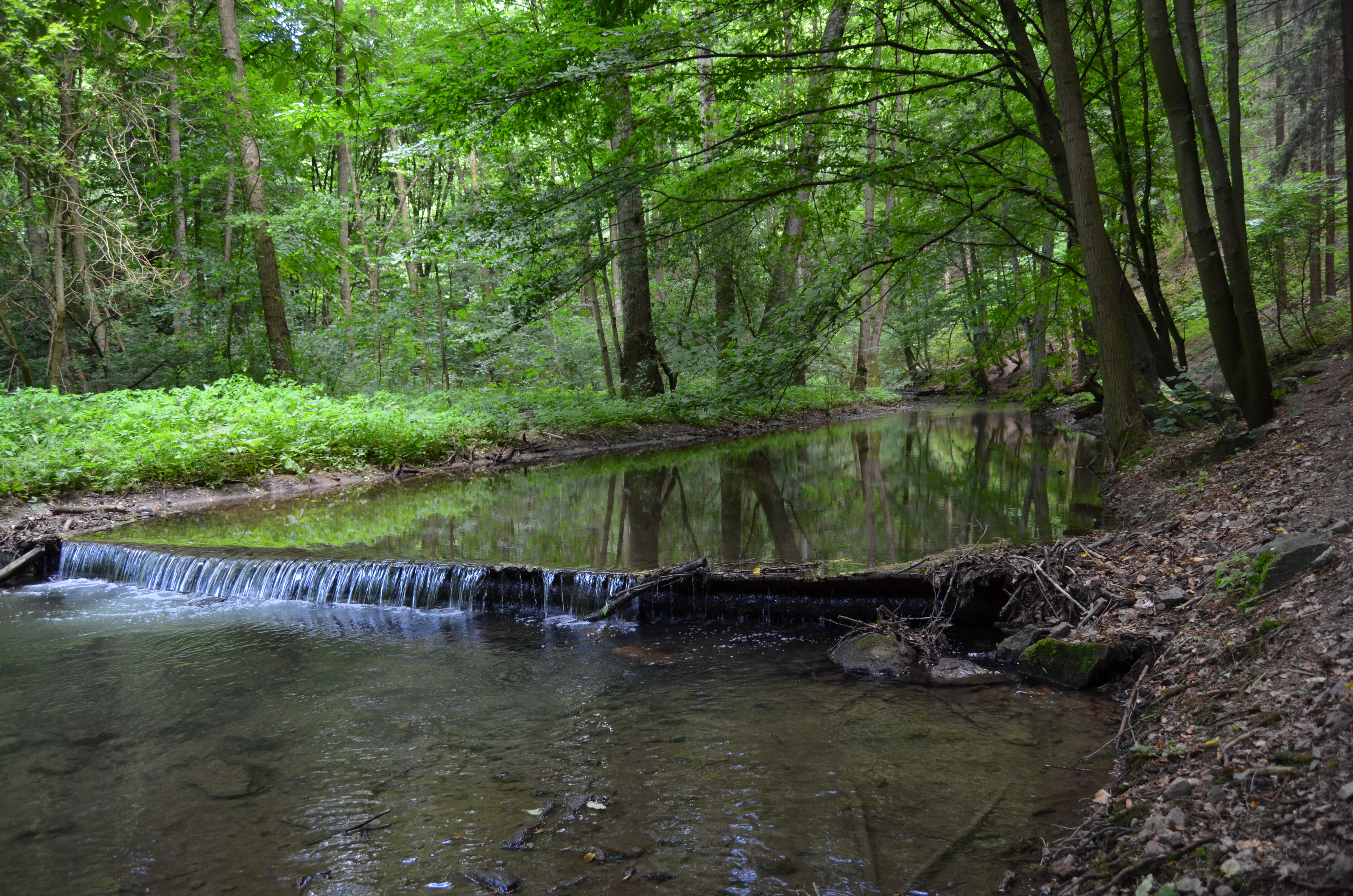 Křtinský potok v Křtinském údolí nedaleko Adamova